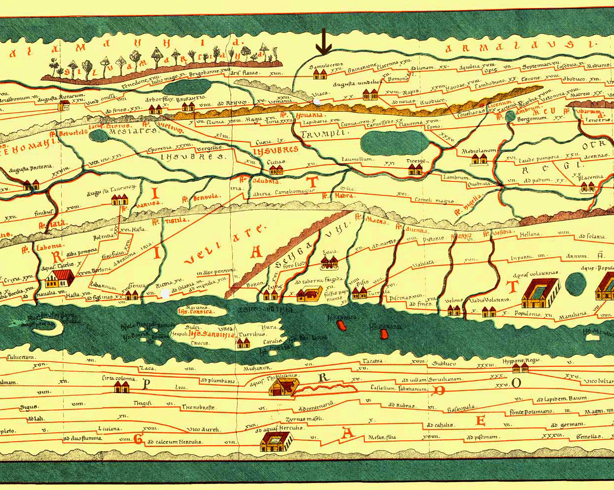 Ausschnitt aus der Tabula Peutingeriana mit Rottenburg als SAMULOCENIA Pfeil oben Mitte